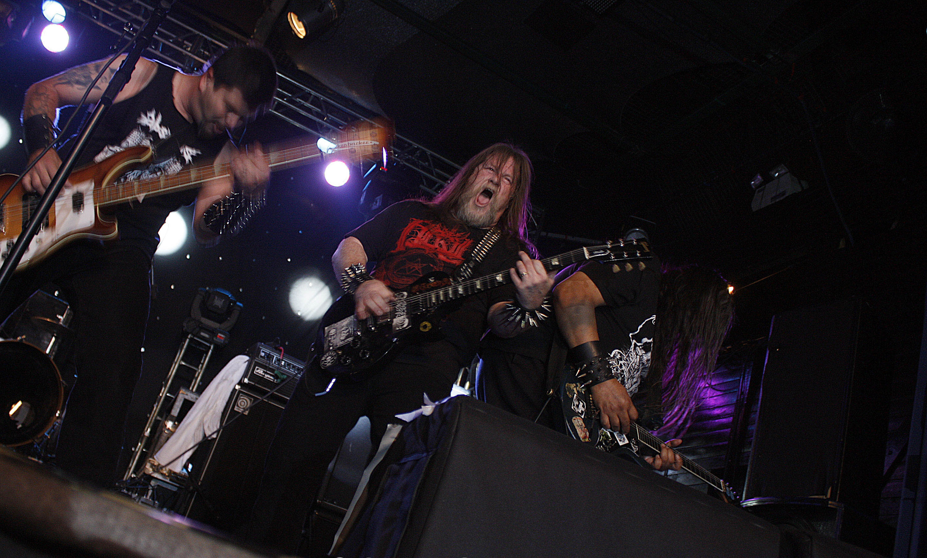 Autopsy in Setembro Negro festival in Brazil (Carioca Club, São Paulo, 08/09/12)